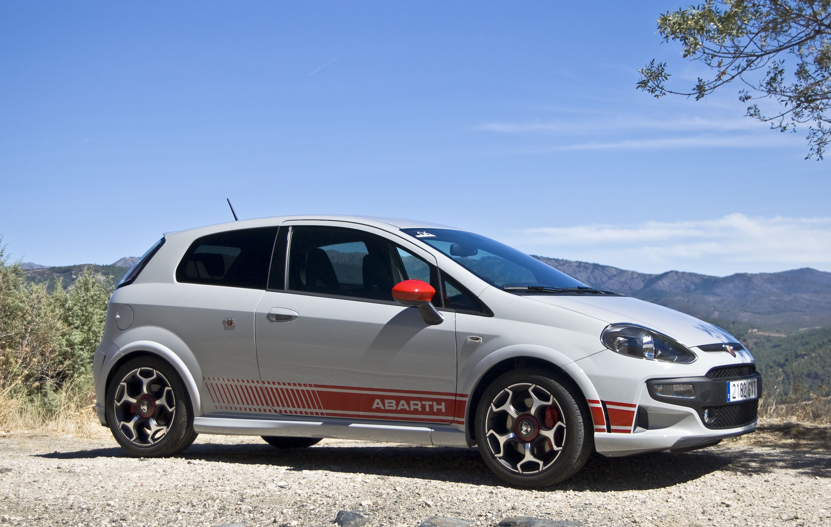 Prueba del Abarth Punto Evo en Diariomotor